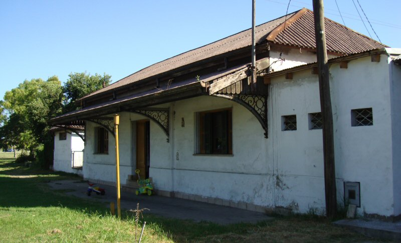 Estación Gambier del ex FCPBA